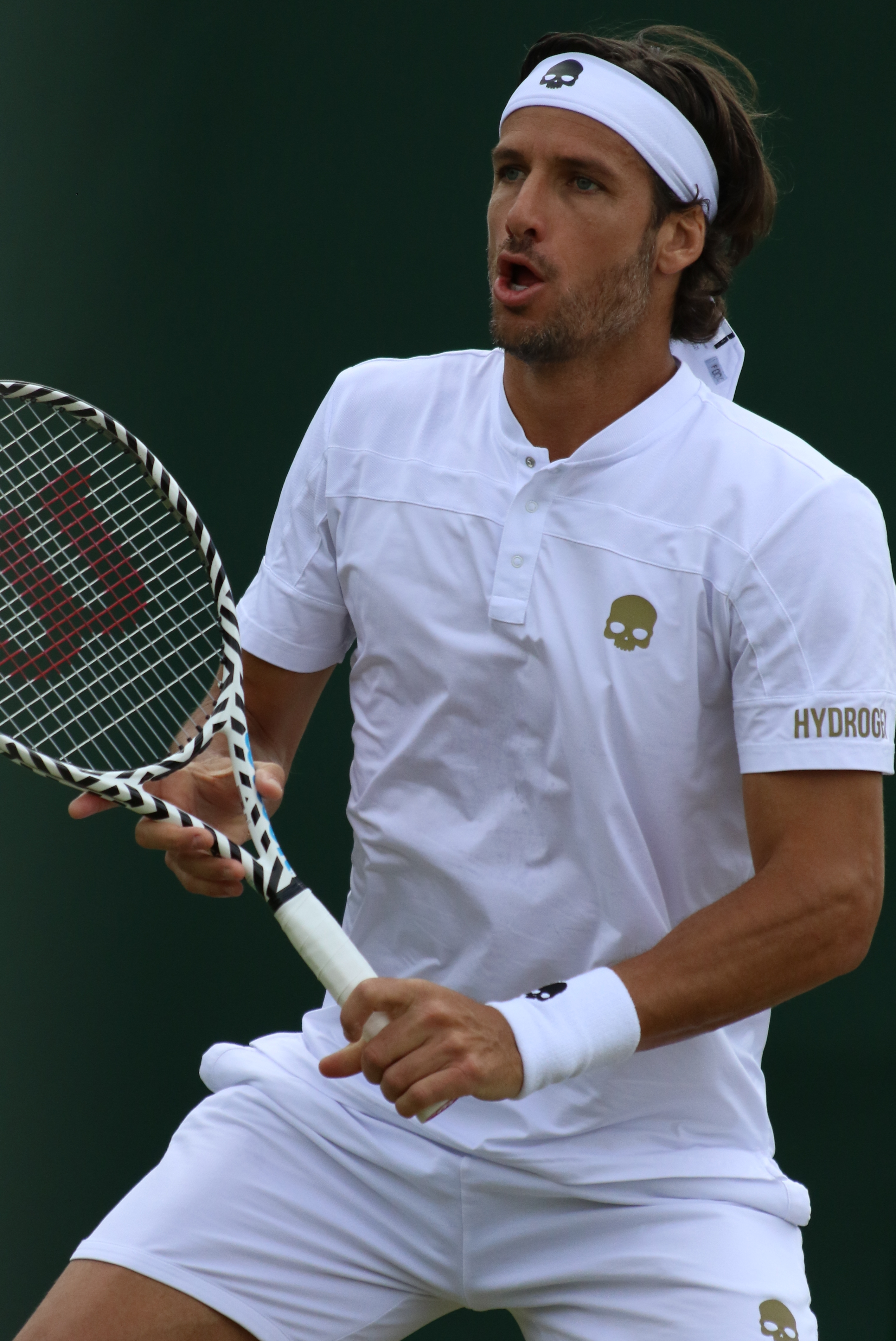 Lopez F. WM19 (13)